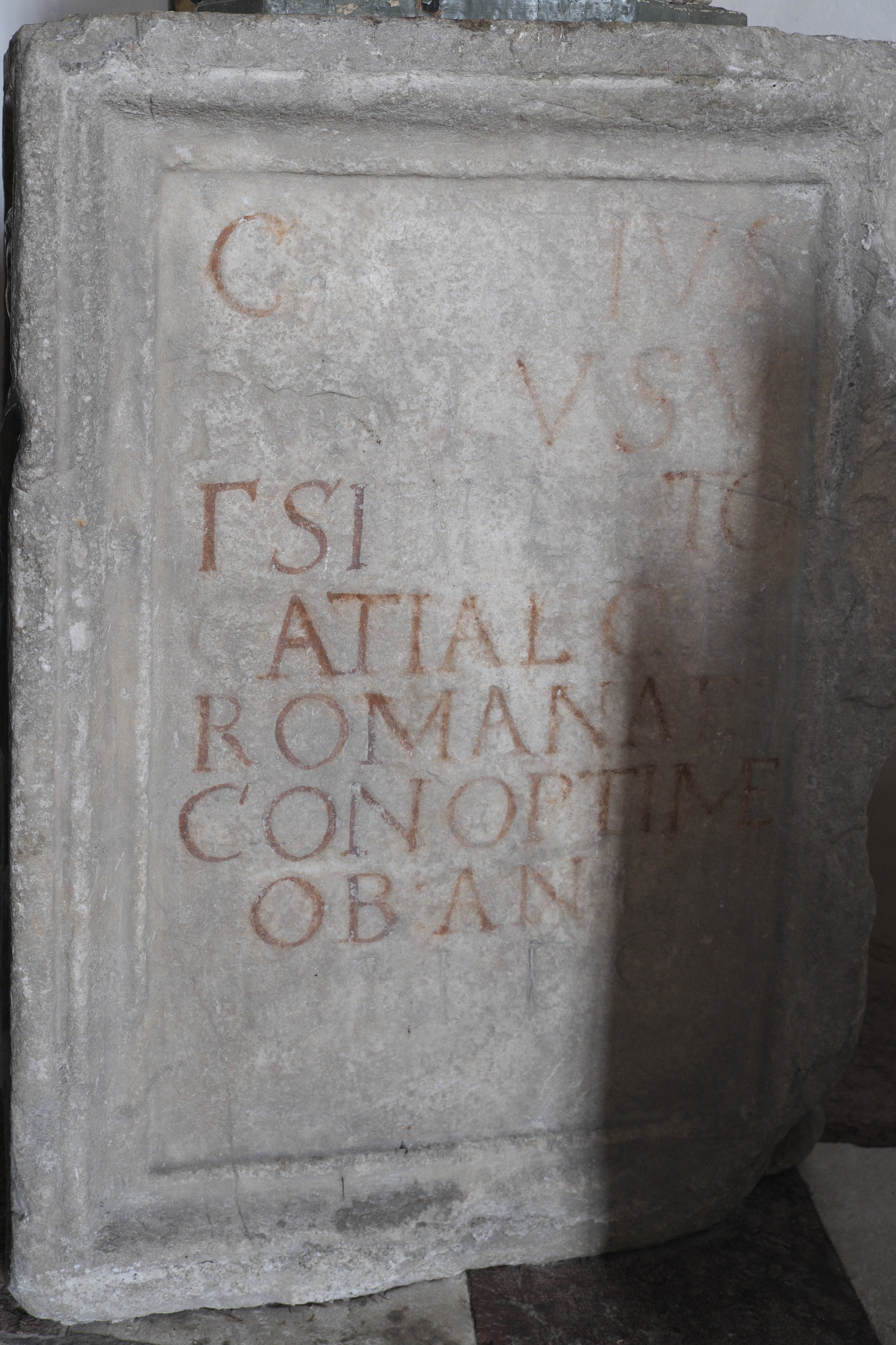 Katholische Pfarrkirche Mariä Himmelfahrt in Gröbming im Bundesland Steiermark (Österreich), römischer Grabstein